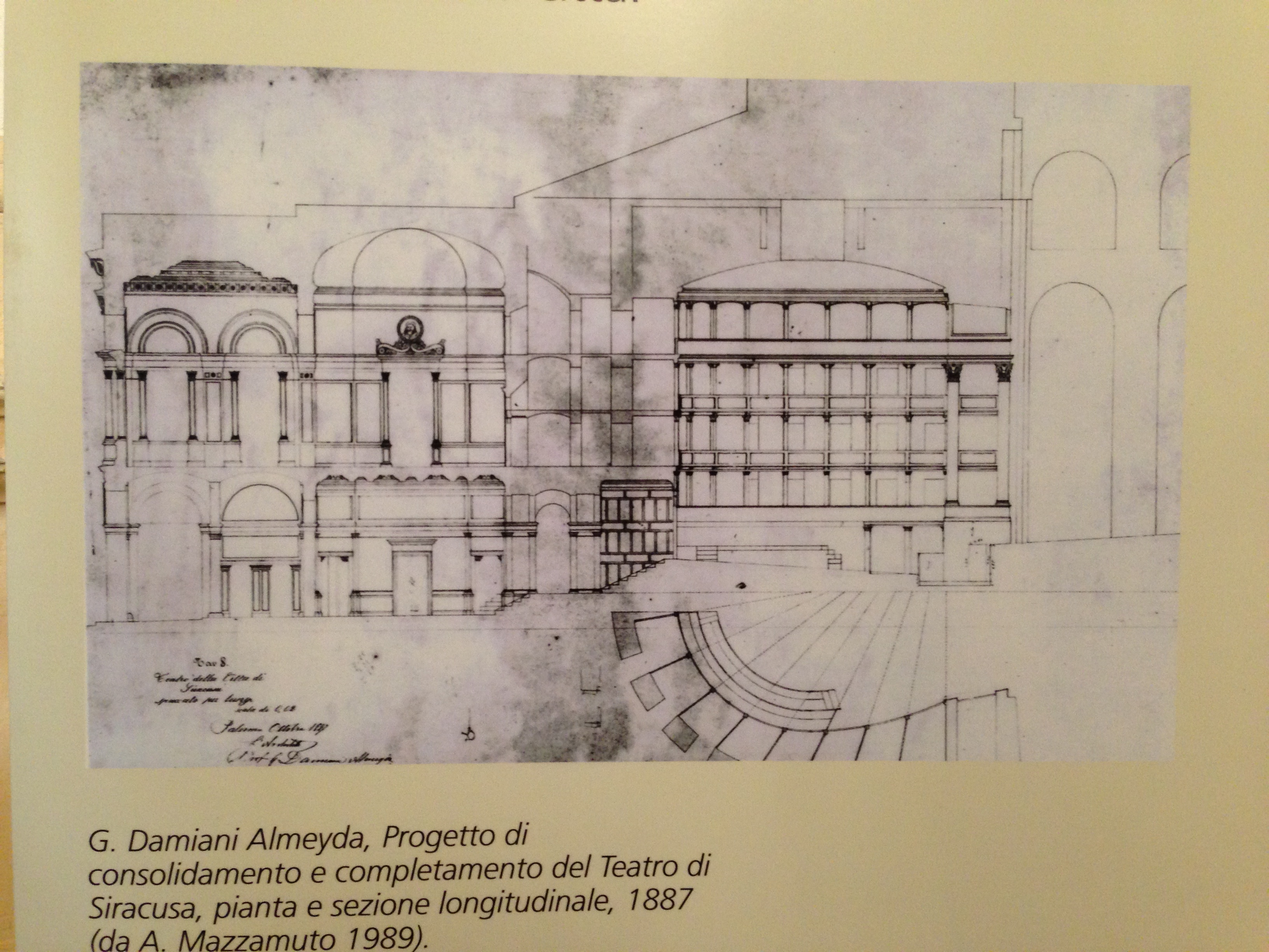 Pianta 1 teatro Siracusa